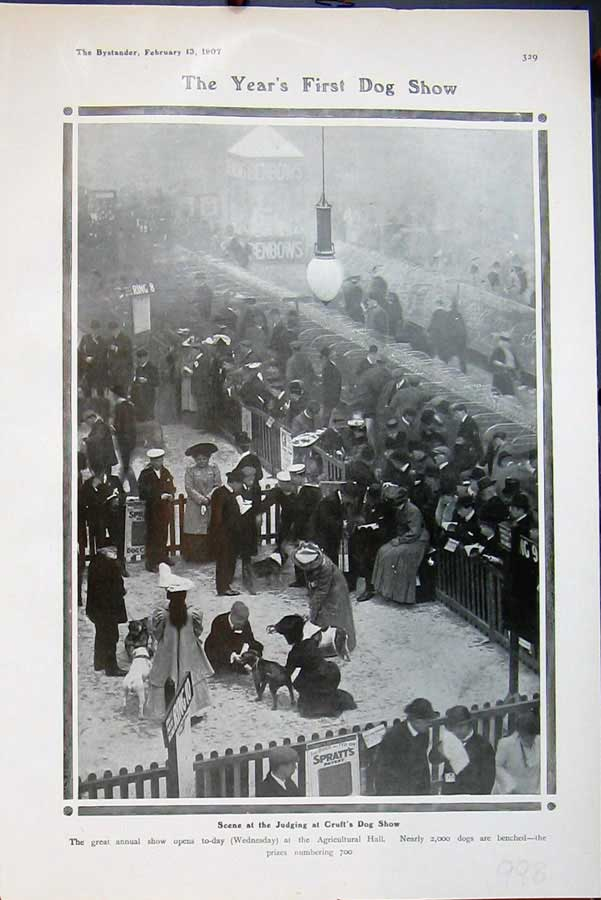 Crufts 1907